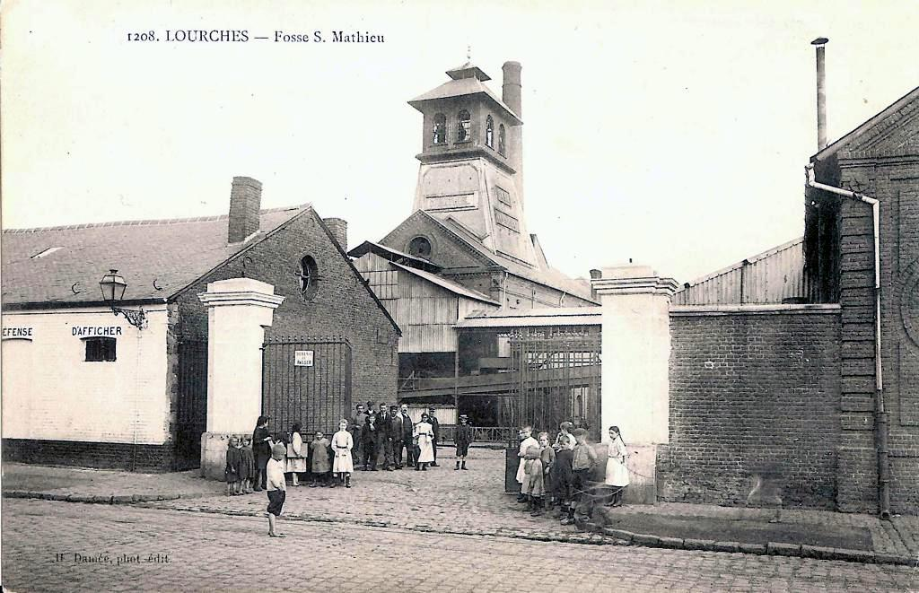 Anciennes Fosse-Saint Mathieu de Lourches aujourd'hui disparue